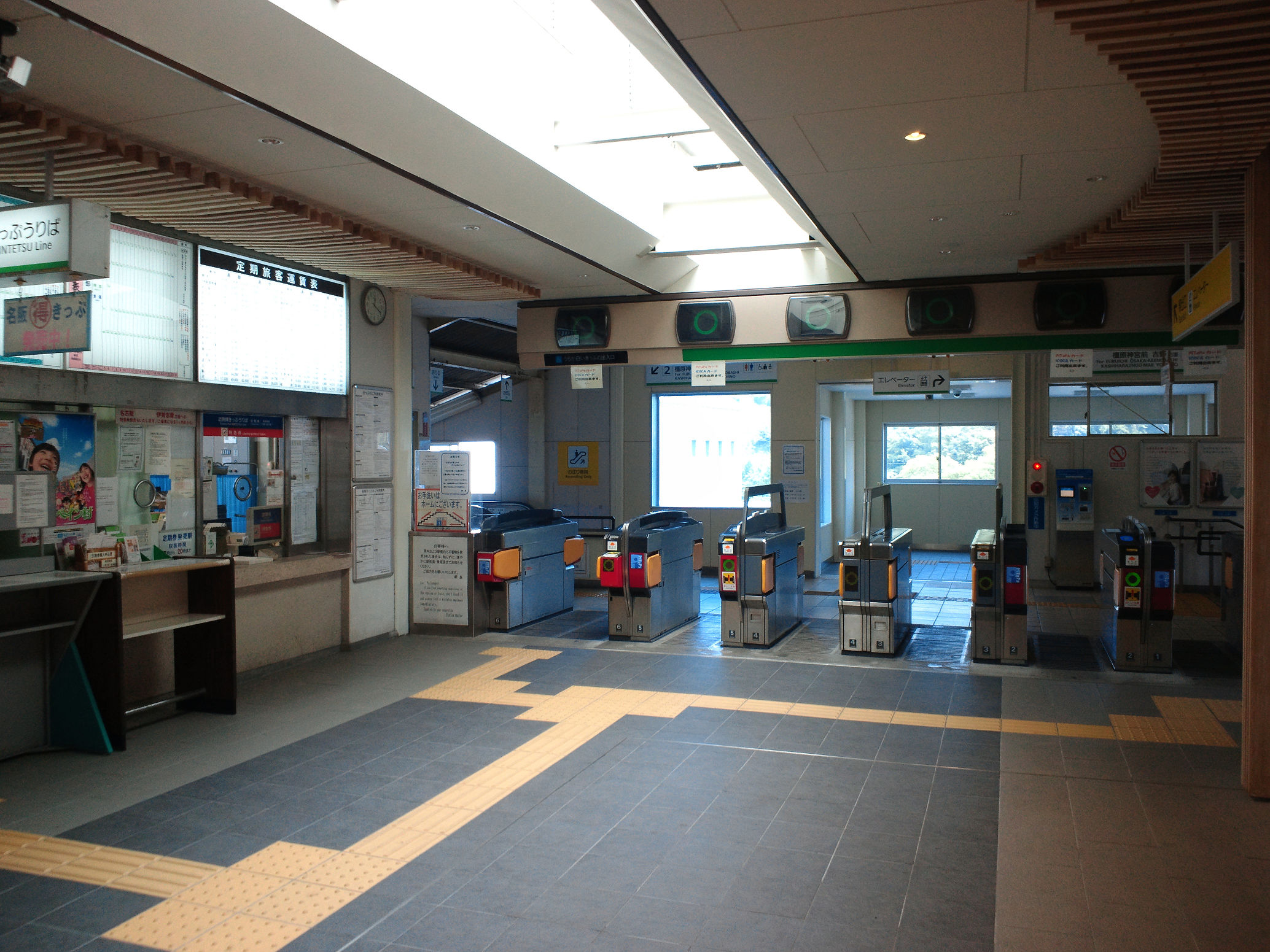 近鉄河内長野駅改札